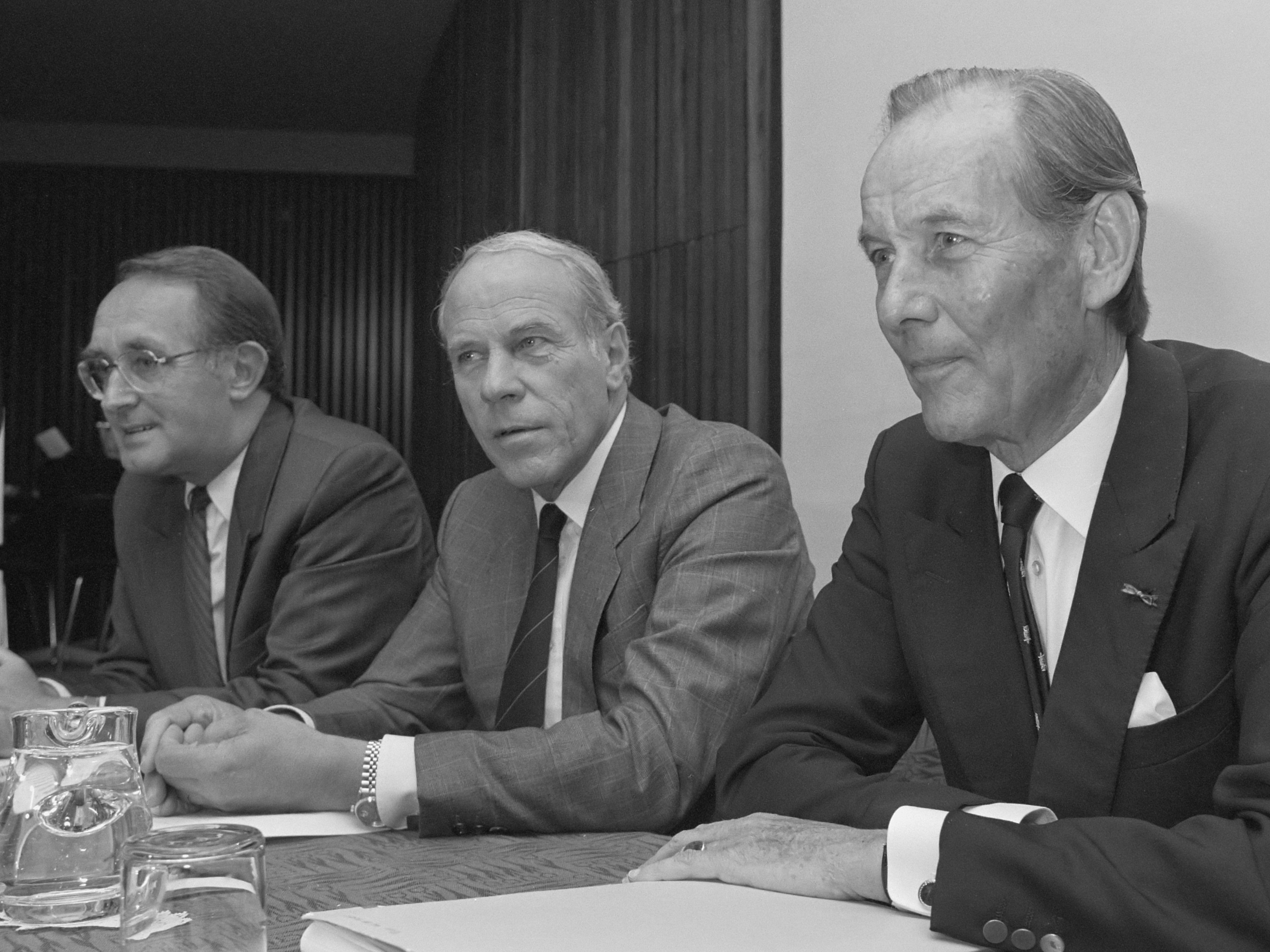 Jaarverslag KLM (1987/88); v.l.n.r. directeur drs. P. Bouw , plv. pres.-dir. ir. L. J. van Ameyden en pres.-dir. mr. J. F. A. de Soet 19 juli 1988